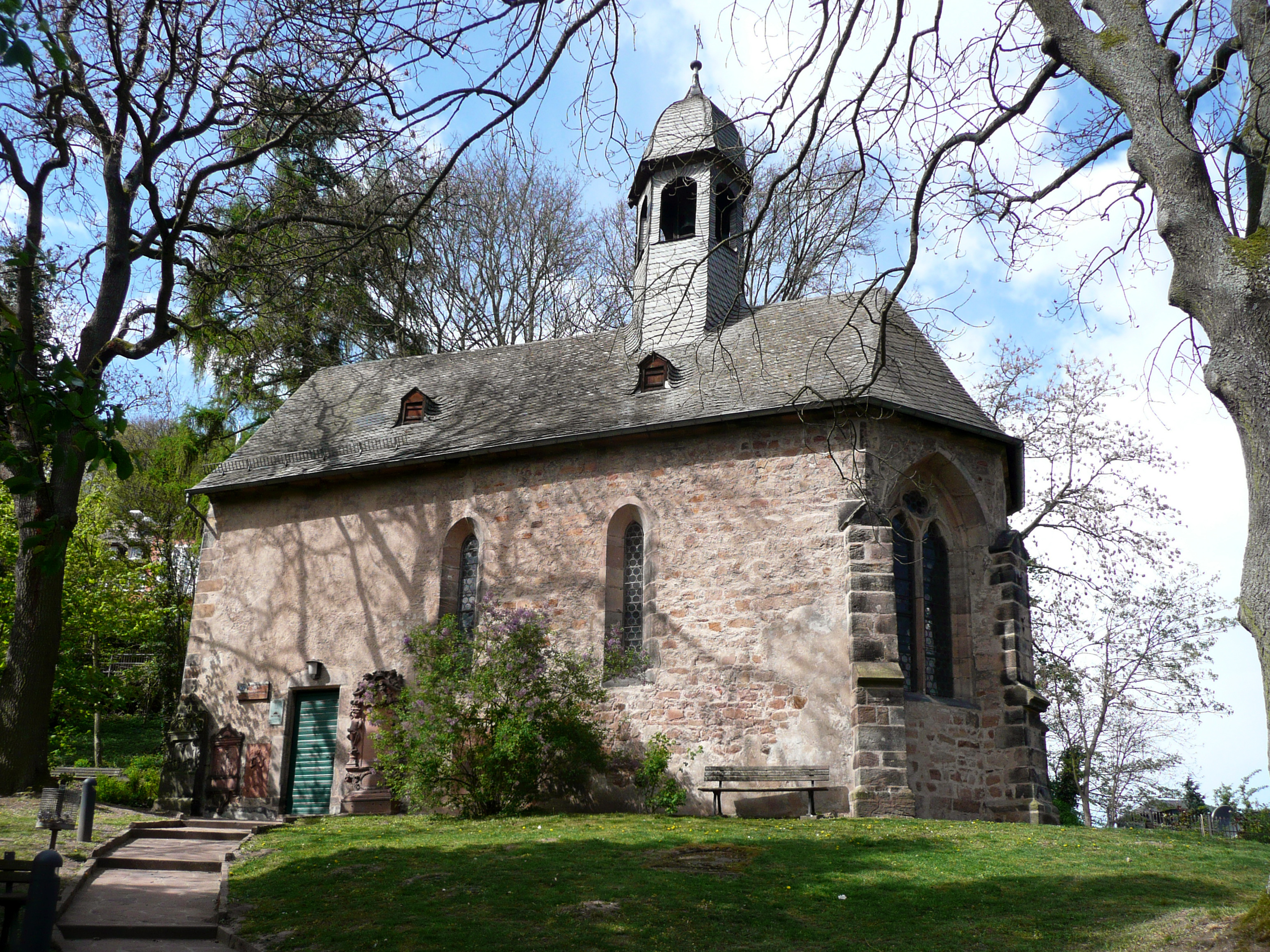 St. Michaelskapelle ("Michelchen") auf dem mittelalterlichen Pilgerfriedhof gegenüber der Elisabetkirche in Marburg, geweiht 1270. Ansicht von SO.